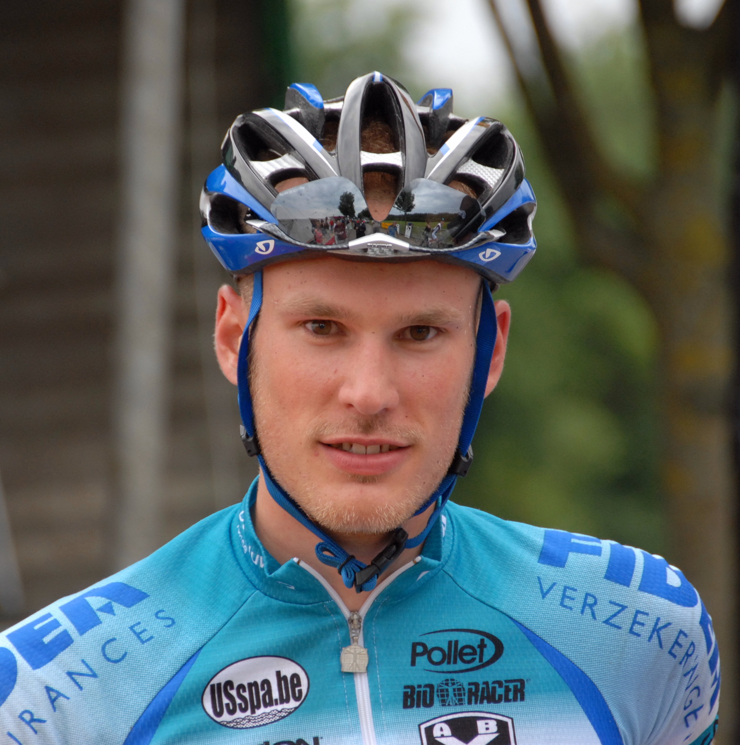 Jempy Drucker jun. nom GP Alex Hoffmann / GP Logis Décor 2007 zu Déifferdéng